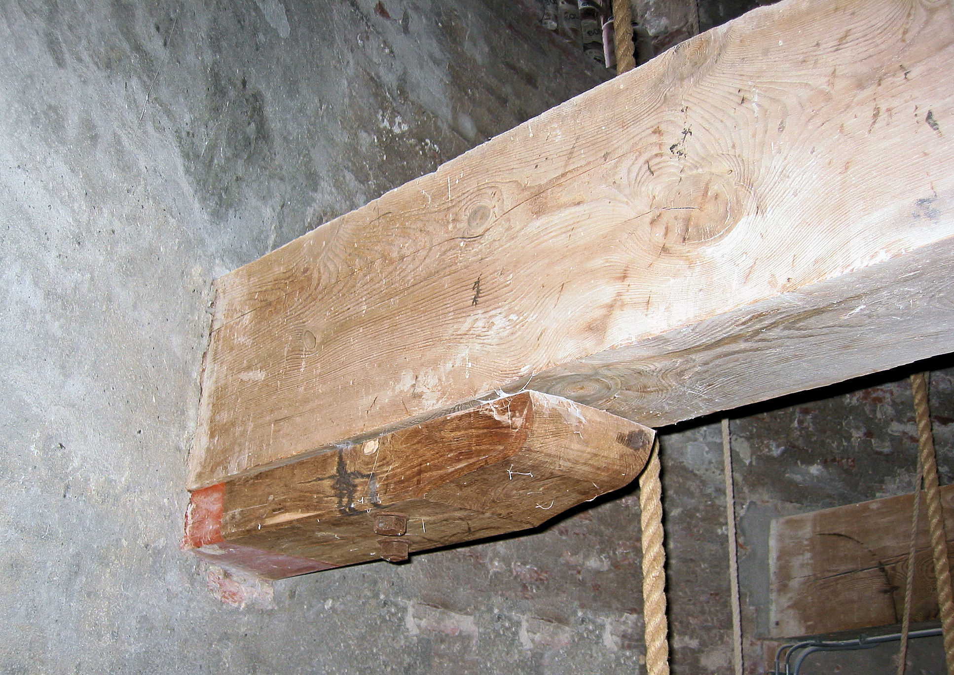 De Hoop sleutelstuk, in Garderen, Gelderland, the Netherlands